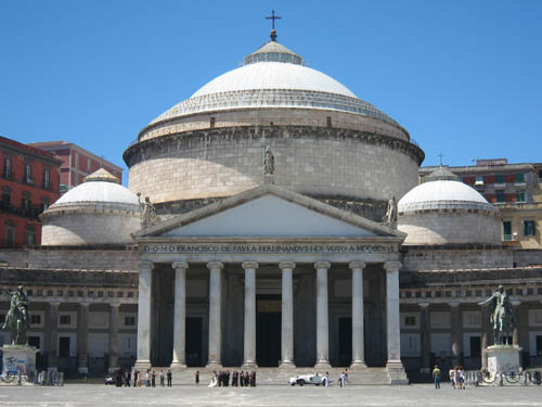 Базилика Сан Франческа ди Паола, Неаполь